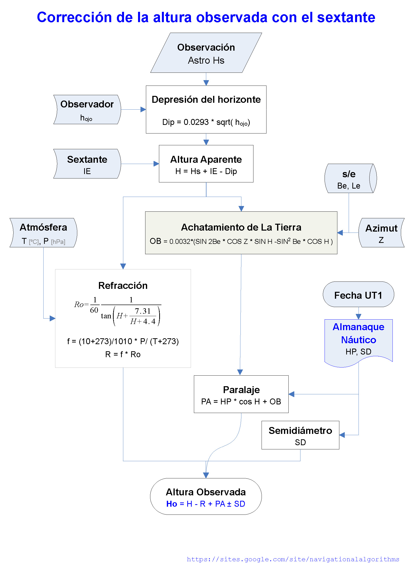 Proceso de correción de la altura tomada con un sextante para obtener la altura verdadera u observada